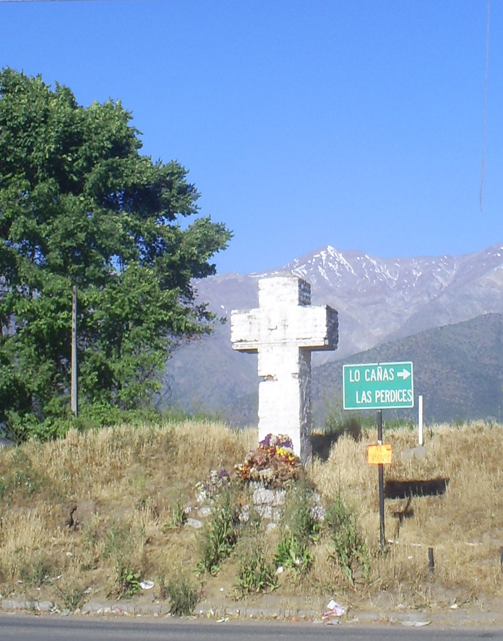 Cruz que recuerda a los muertos en la "masacre de Lo Cañas", ubicada en Avenida Tobalaba con Walker Martínez en la comuna de La Florida, Santiago de Chile. Esta fue destruida por el Terremoto del 27 de febrero de 2010, y reconstruida en septiembre del mismo año.